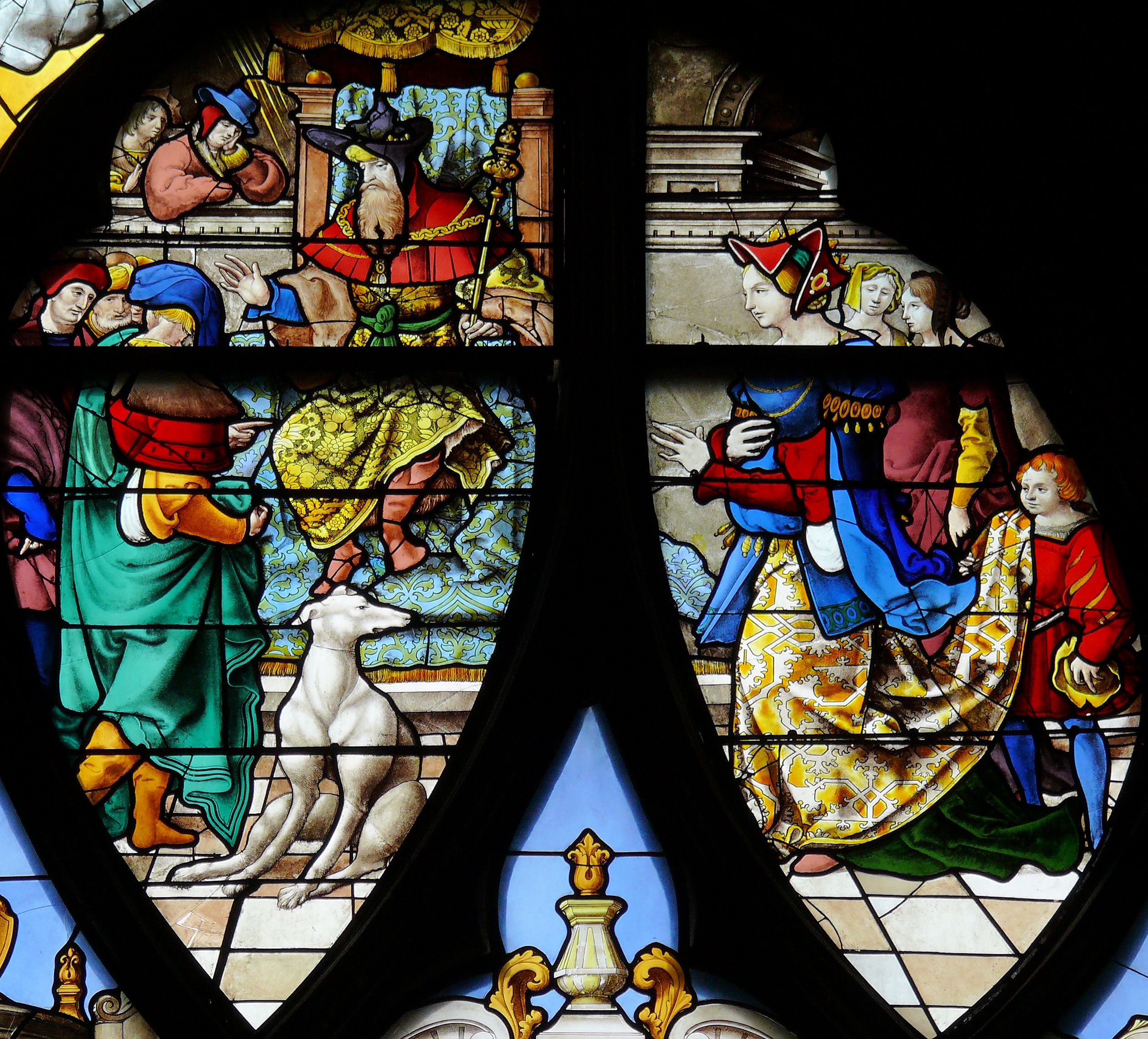 Paris - Eglise Saint-Gervais-Saint-Protais - Verrière de la Sagesse de Salomon - Tympan - Ajours de droite - Salomon recevant la reine de Saba